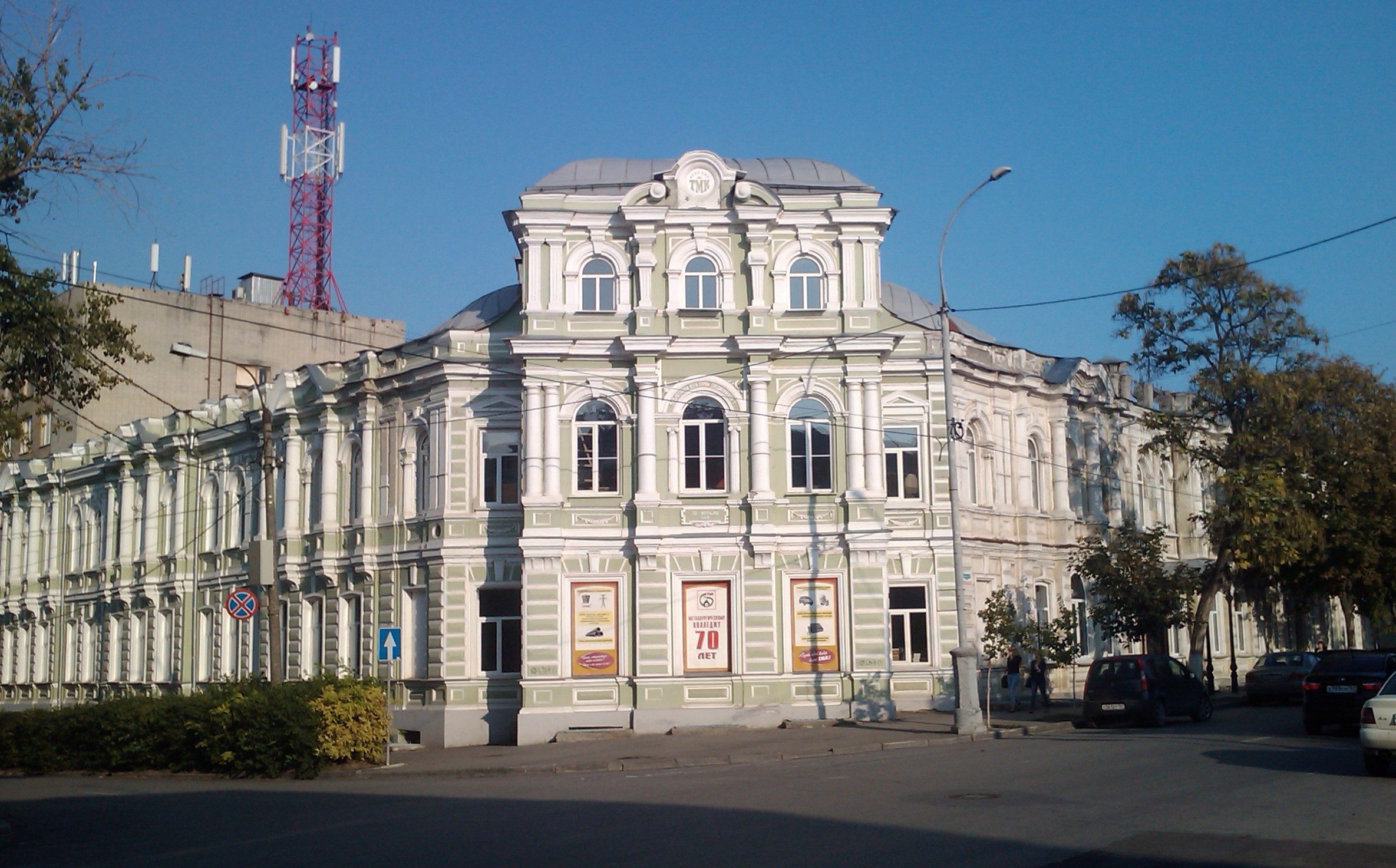 Таганрог, Добролюбовский переулок, Дом Джурича.